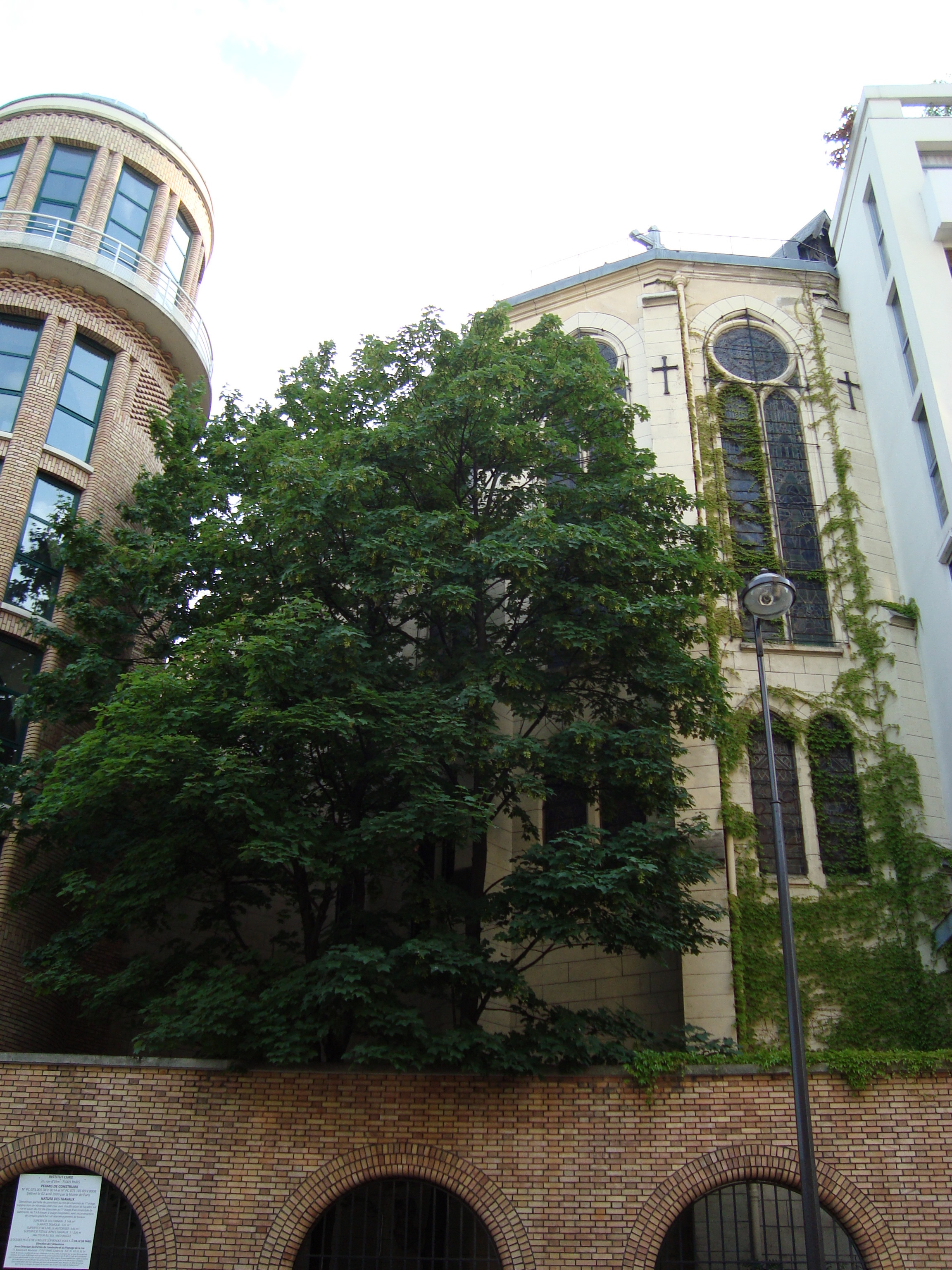 Chapelle Notre-Dame du Liban sise dans l'enceinte de l'Institut Curie, rue Lhomond à Paris. Institut Curie sur la gauche.